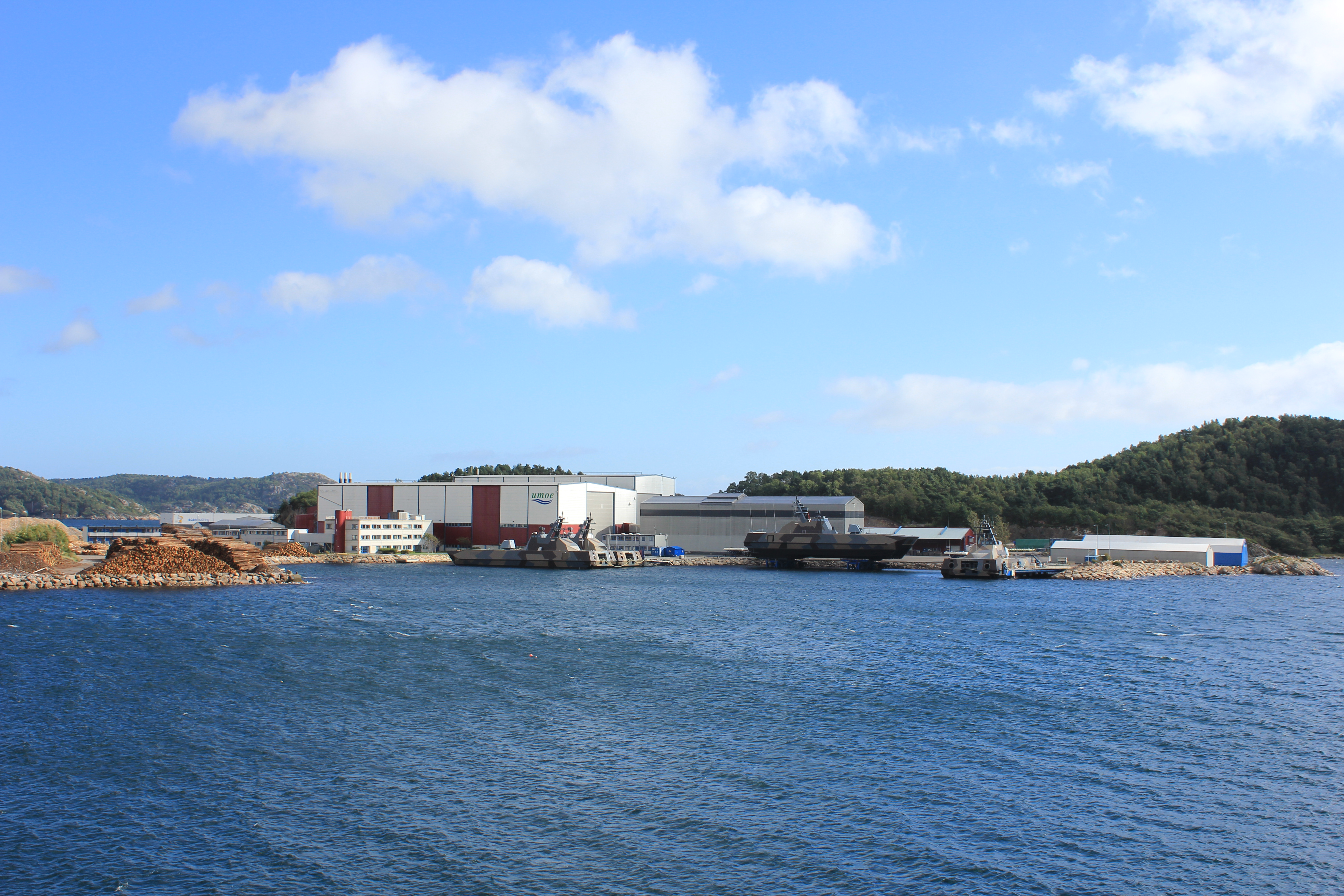 Umoe Mandal